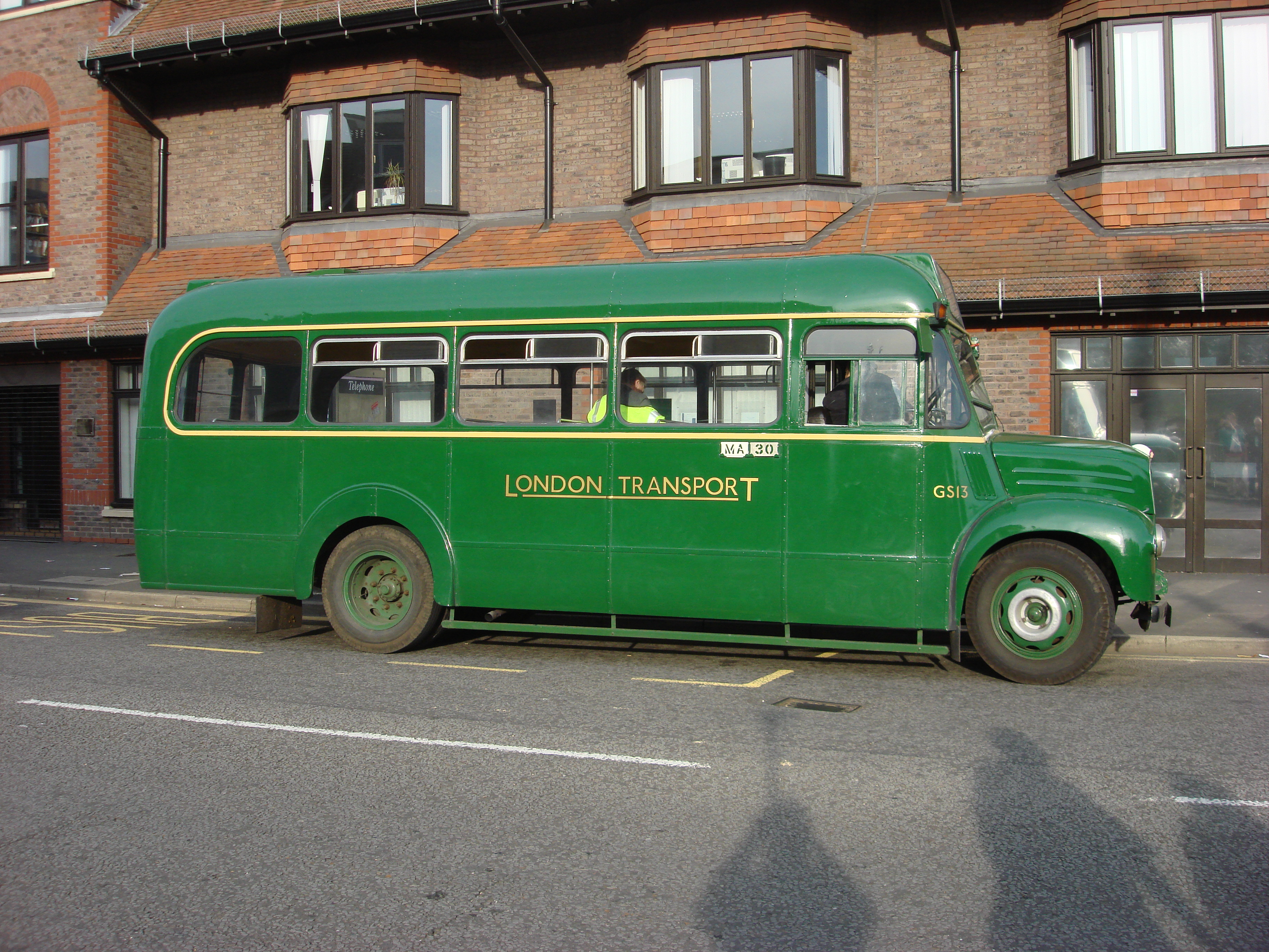 GS13 seen here at Amersham Heritage Open Day